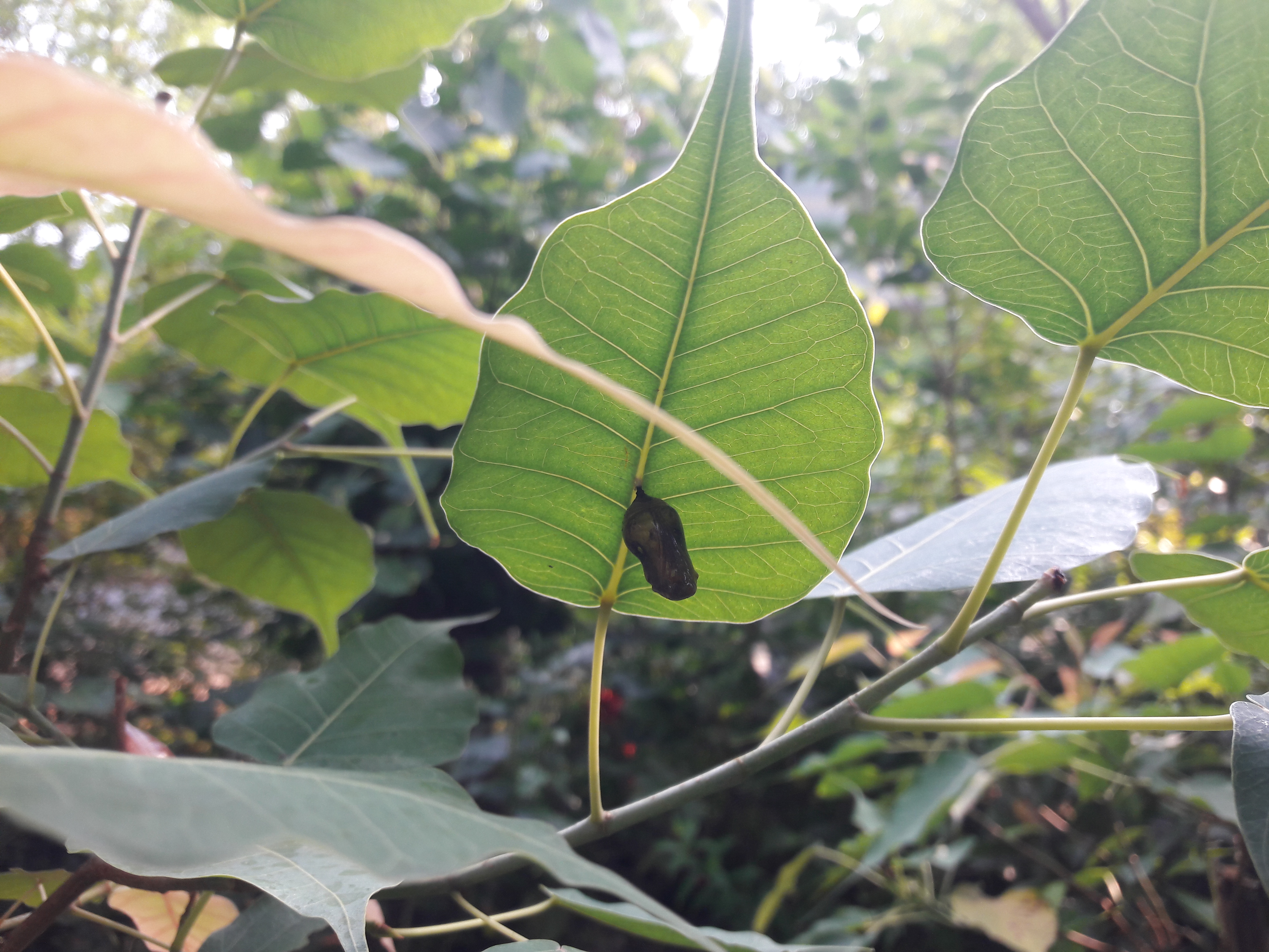 ആതിഥേയ വൃക്ഷമായ അരയാൽ മരത്തിന്റെ ഇലയിൽ ചിത്രശലഭത്തിന്റെ സമാധി. Peepal tree ശാസ്ത്രീയ നാമം Ficus religiosa കുടുംബം Moraceae.